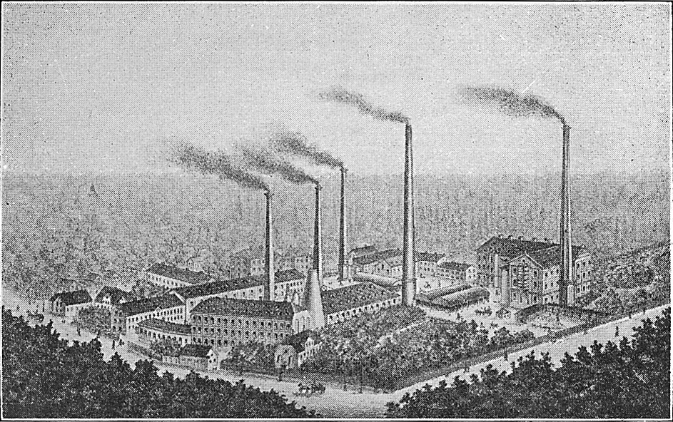 Den kongelige Porcelænsfabrik og "Aluminia" i slutningen af 1800-tallet.